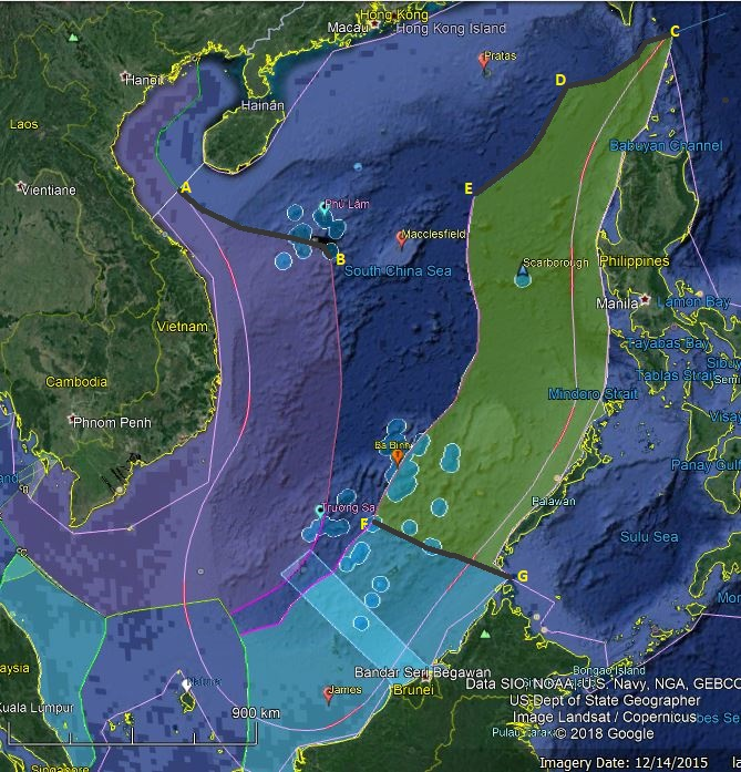 Bản đồ đòi hỏi chủ quyền của các bên tranh chấp (phần lớn dựa trên các tài liểu và bản đồ đã được các bên công bố chính thức - những chỗ chưa có văn kiện chính thức thì dùng trung tuyến)